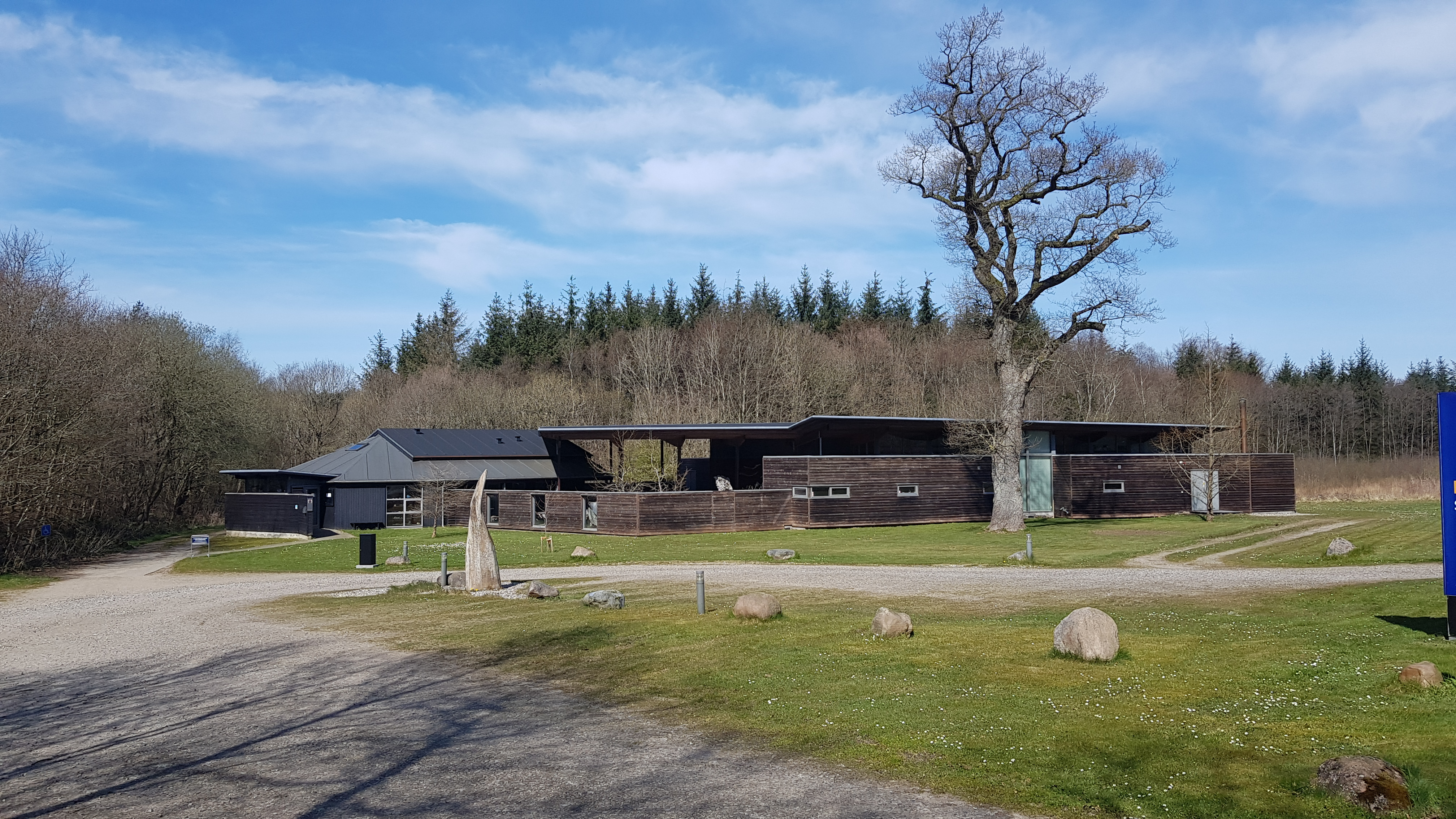 Museum for Naturhistorie og Palæontologi ved Gram Lergrav